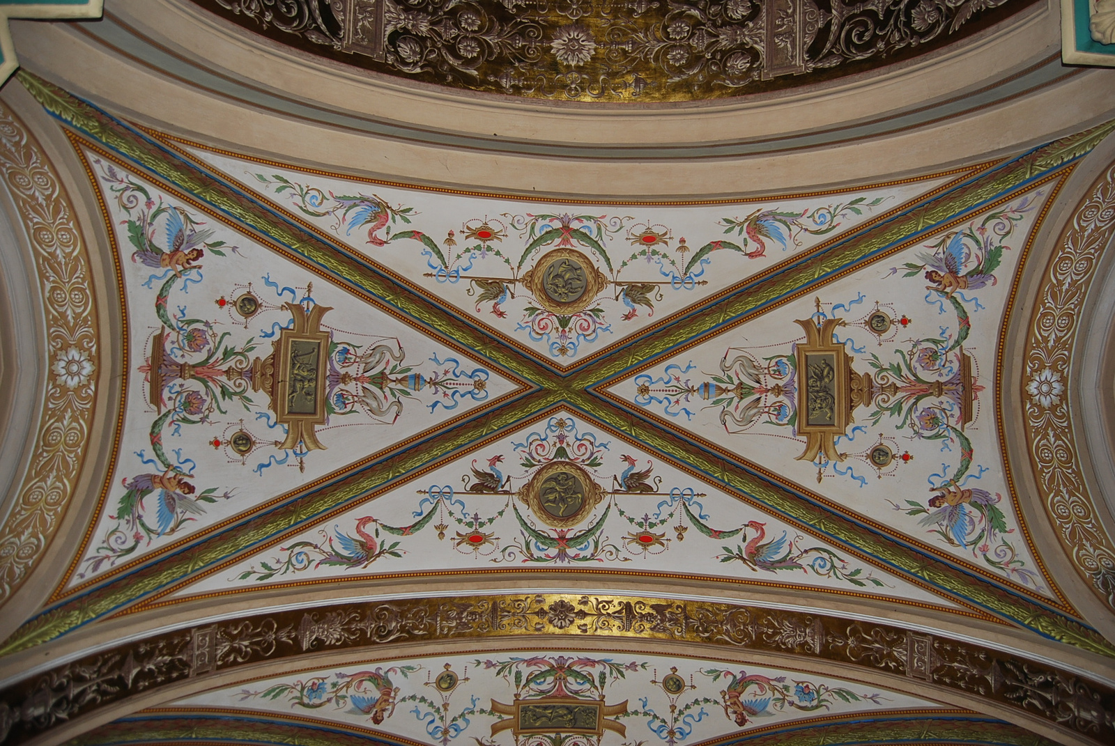 Új városháza (Budapest V. kerület, Váci utca 62-64.) This is a photo of a monument in Hungary. Identifier: 646